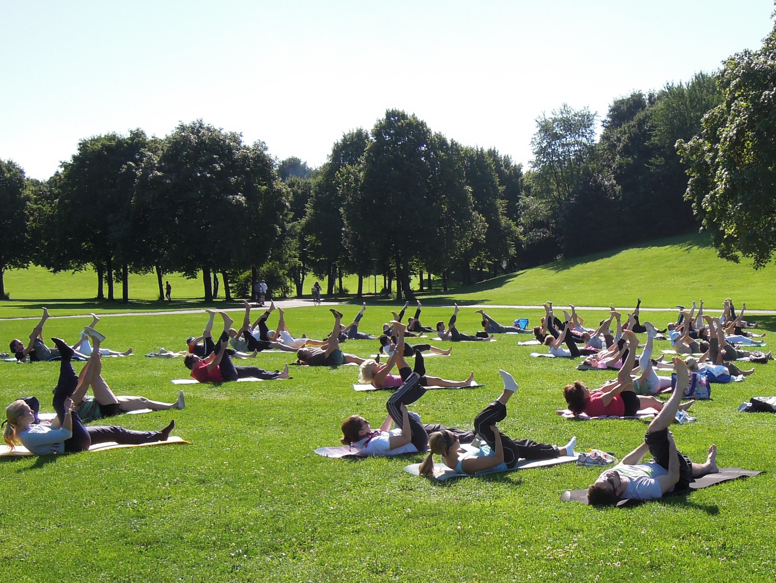 Westpark (München) - Yoga-Übungen (cropped version)